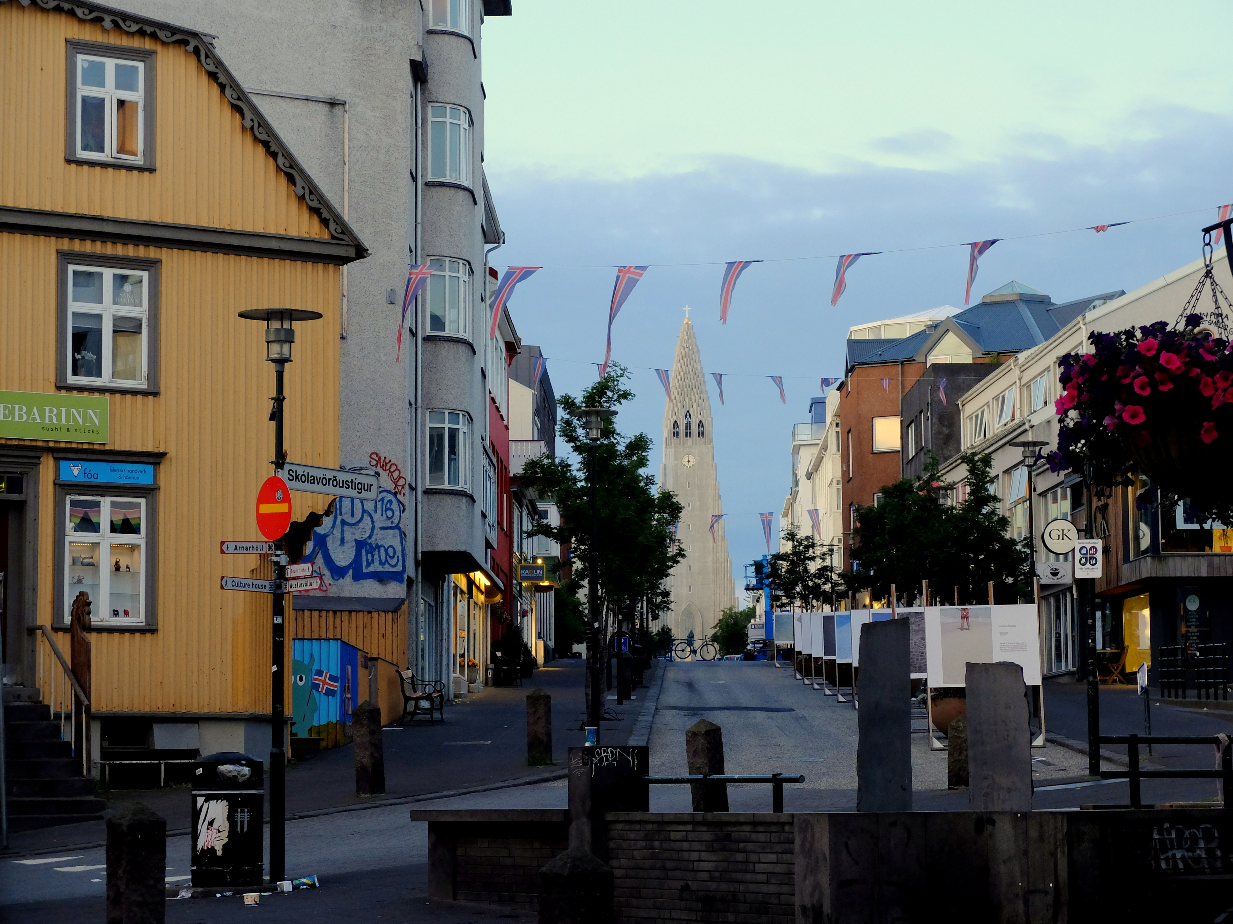 Reykjavík, Innenstadt.